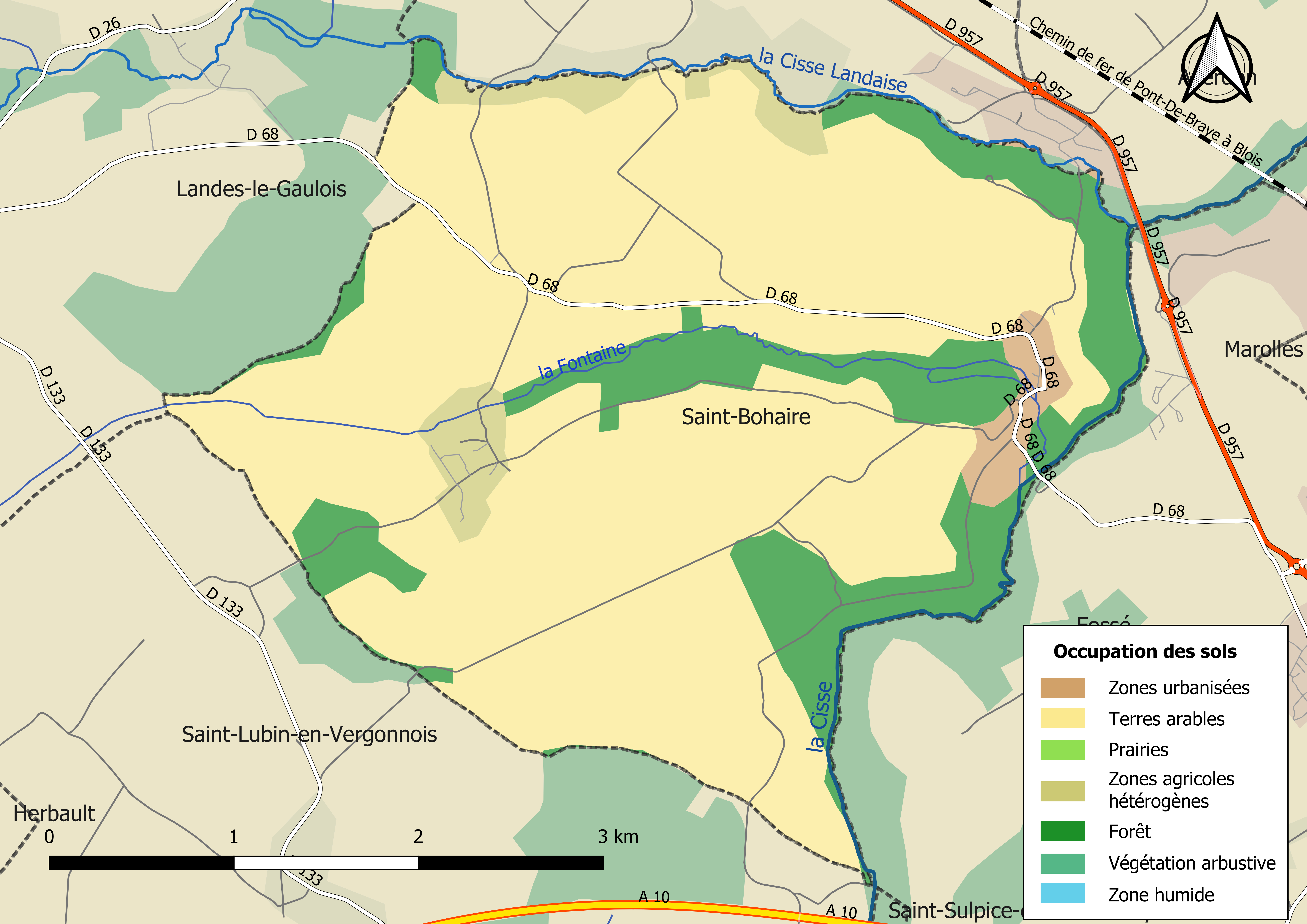 Carte des infrastructures et de l’occupation des sols en 2018 de la commune de Saint-Bohaire (France).